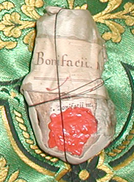 zelf gemaakt